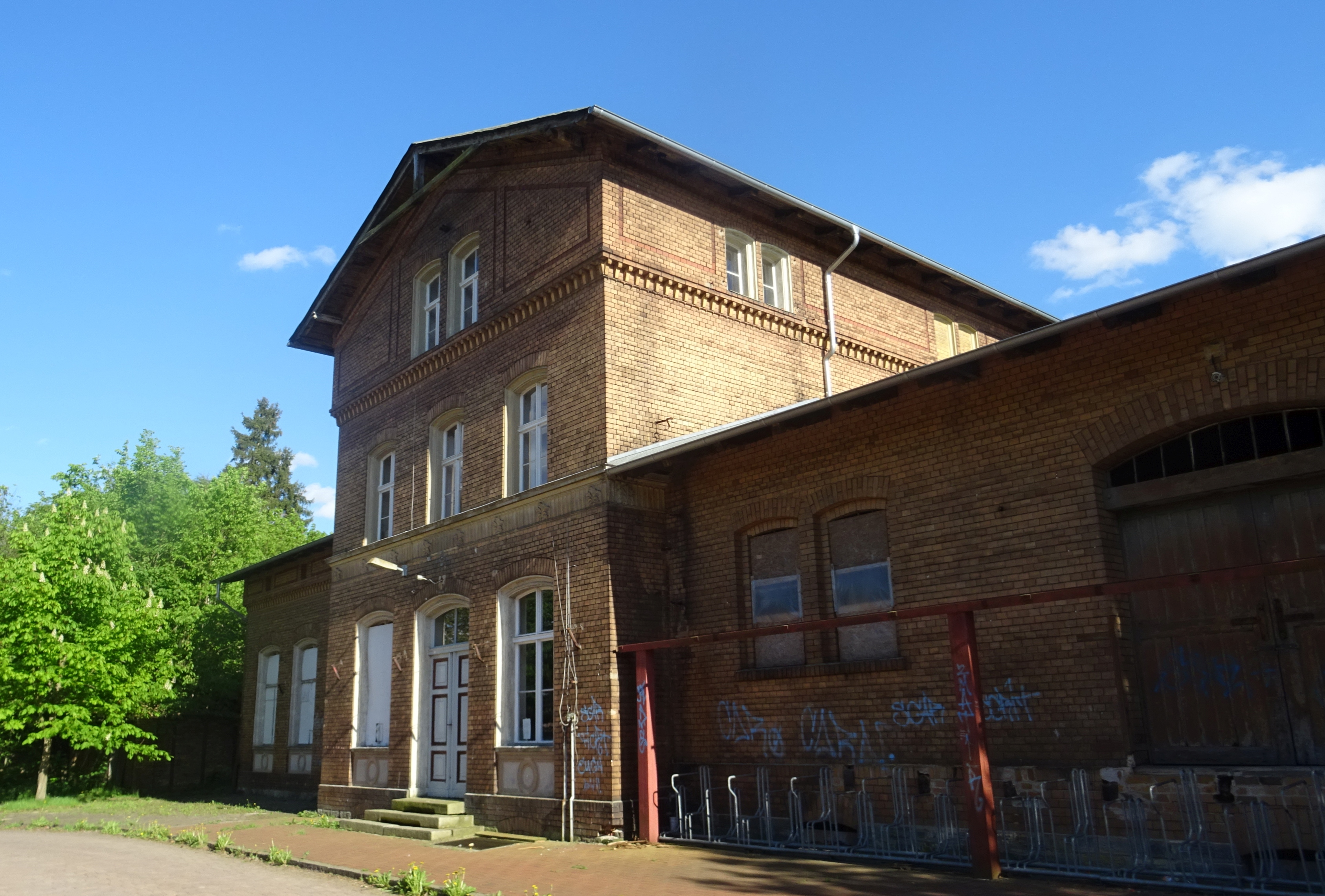 Bahnhof Nedlitz, Straßenseite, Mai 2018